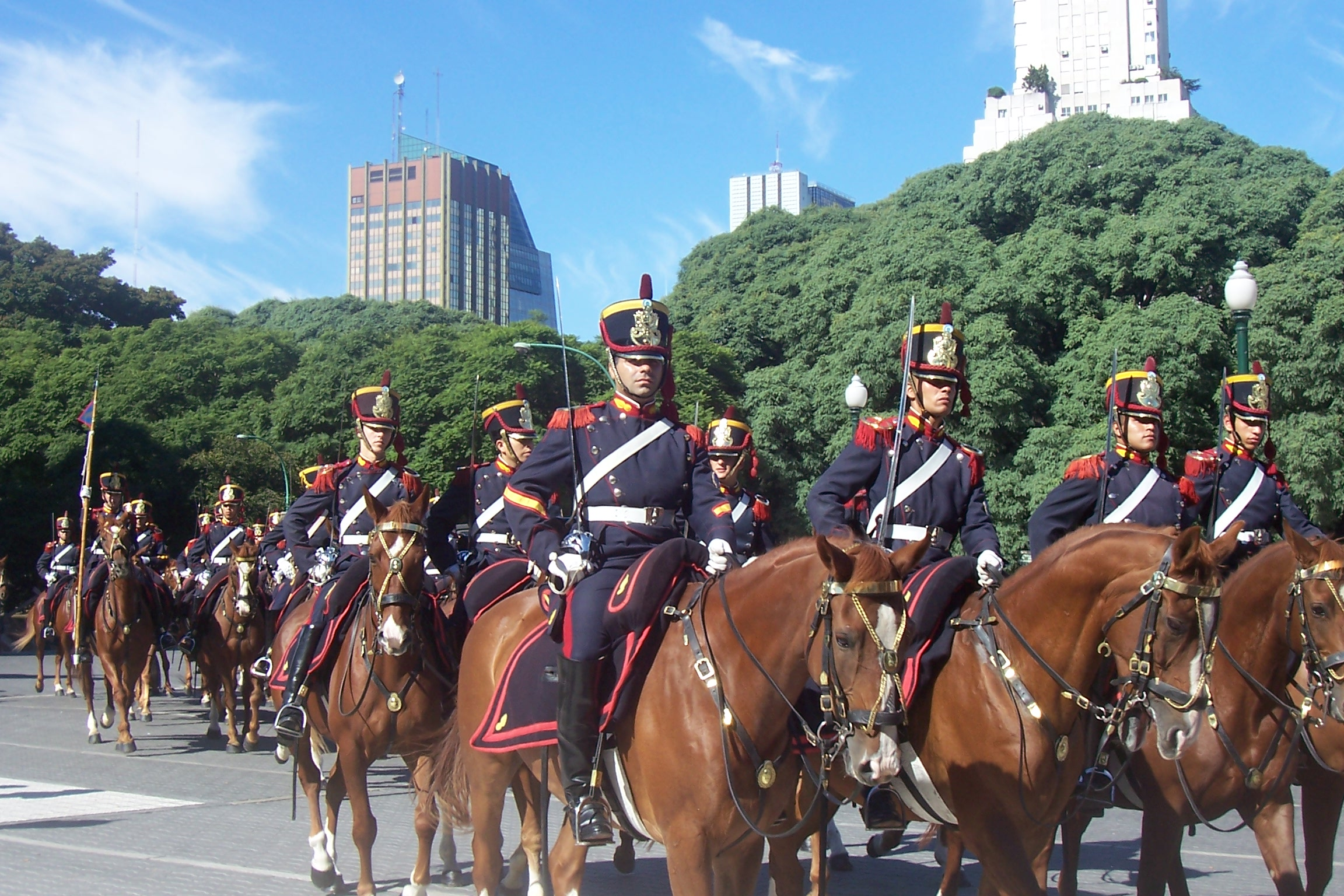 Granaderos a Caballo San Martín, en un acto protocolar por la llegada del primer ministro ruso Mikhail Fradkov a la Argentina. Tomada en la plaza San Martín, barrio de Retiro, ciudad autónoma de Buenos Aires.